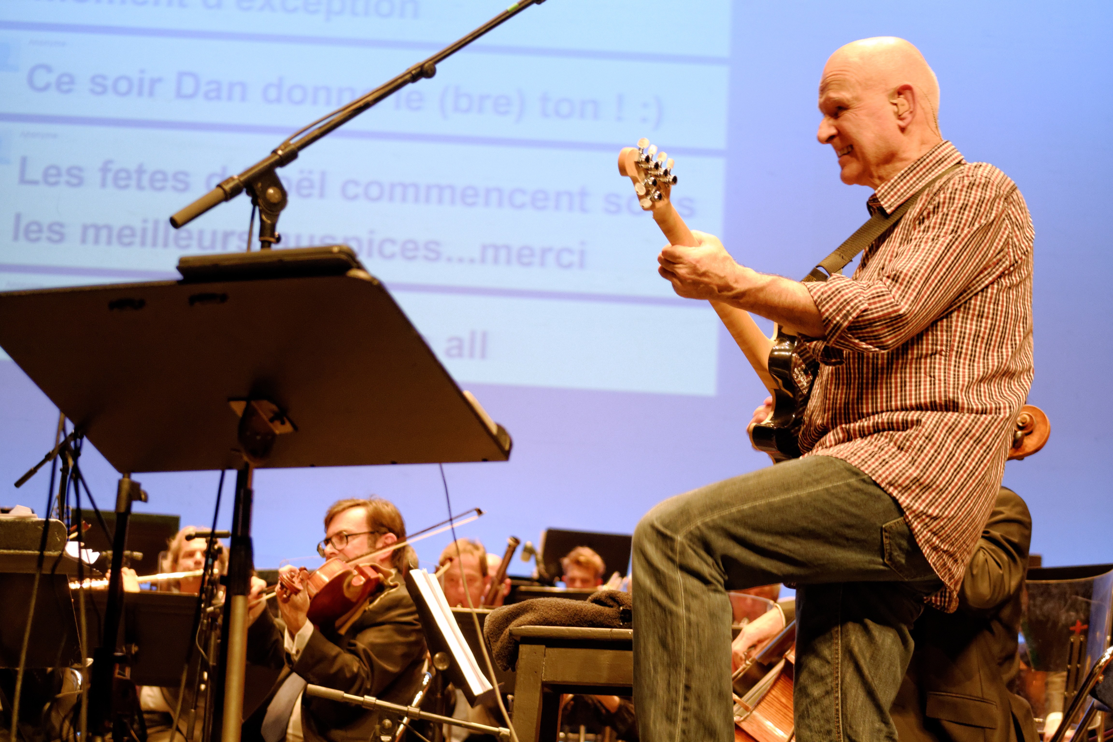 Projet Taliesin #1 de Dan Ar Braz et l'Orchestre symphonique de Bretagne au Théâtre National de Bretagne à Rennes le 18 décembre 2015. Premier concert interactif diffusé sur Internet et trois chaînes bretonnes.